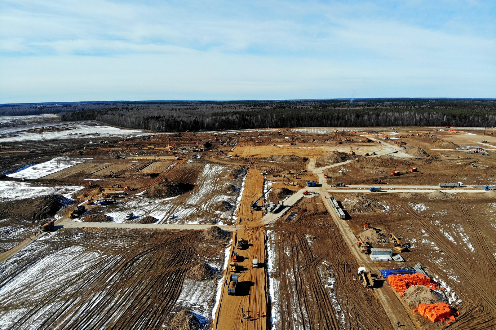 Строительство инфекционного центра в Новой Москве возле деревня бабенки